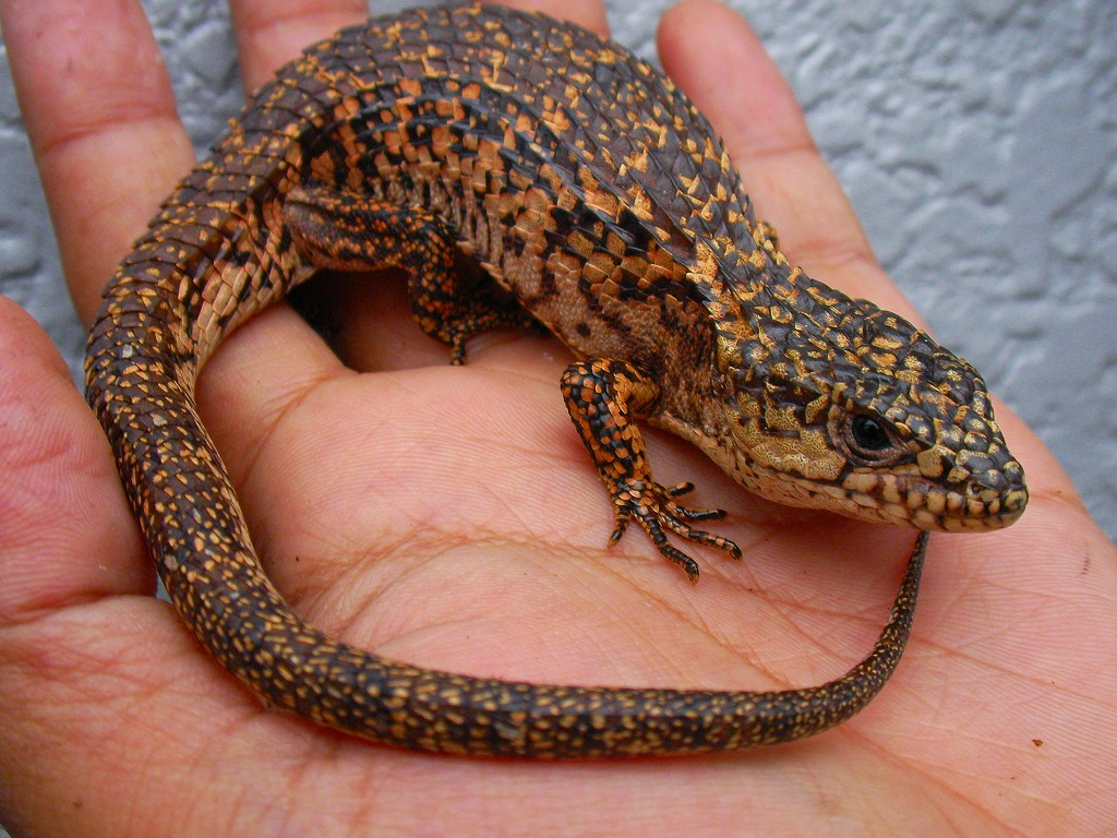 Ejemplar macho de Barisia rudicolis